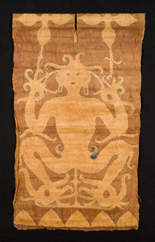 Jak. Op het achterpand een mannelijk, en op het voorpand een vrouwelijk mensfiguur. Jak van geklopte boombast, beschilderd met mensfiguren